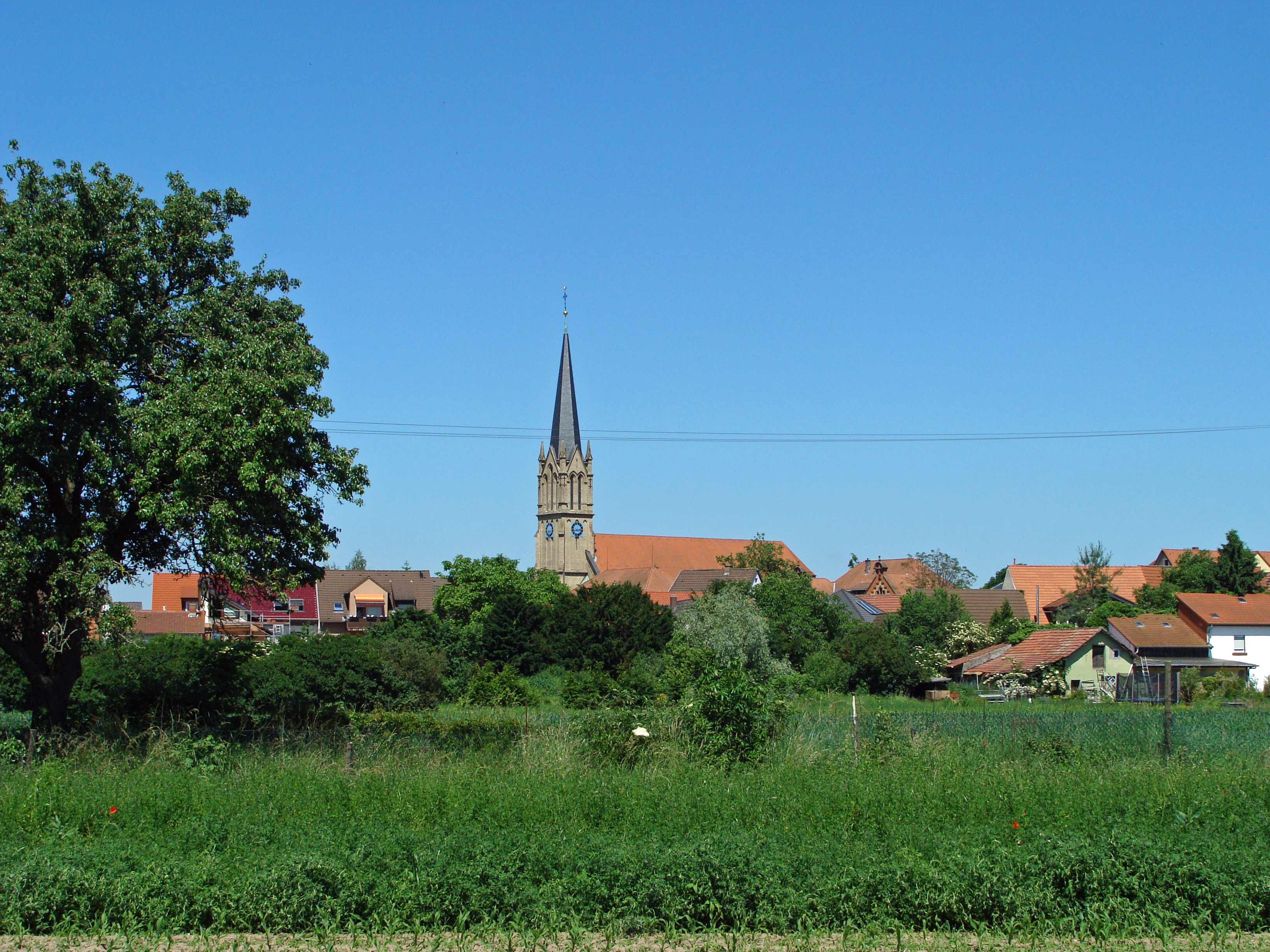 Deutschland: Ansicht der Gemeinde Brühl von Süden